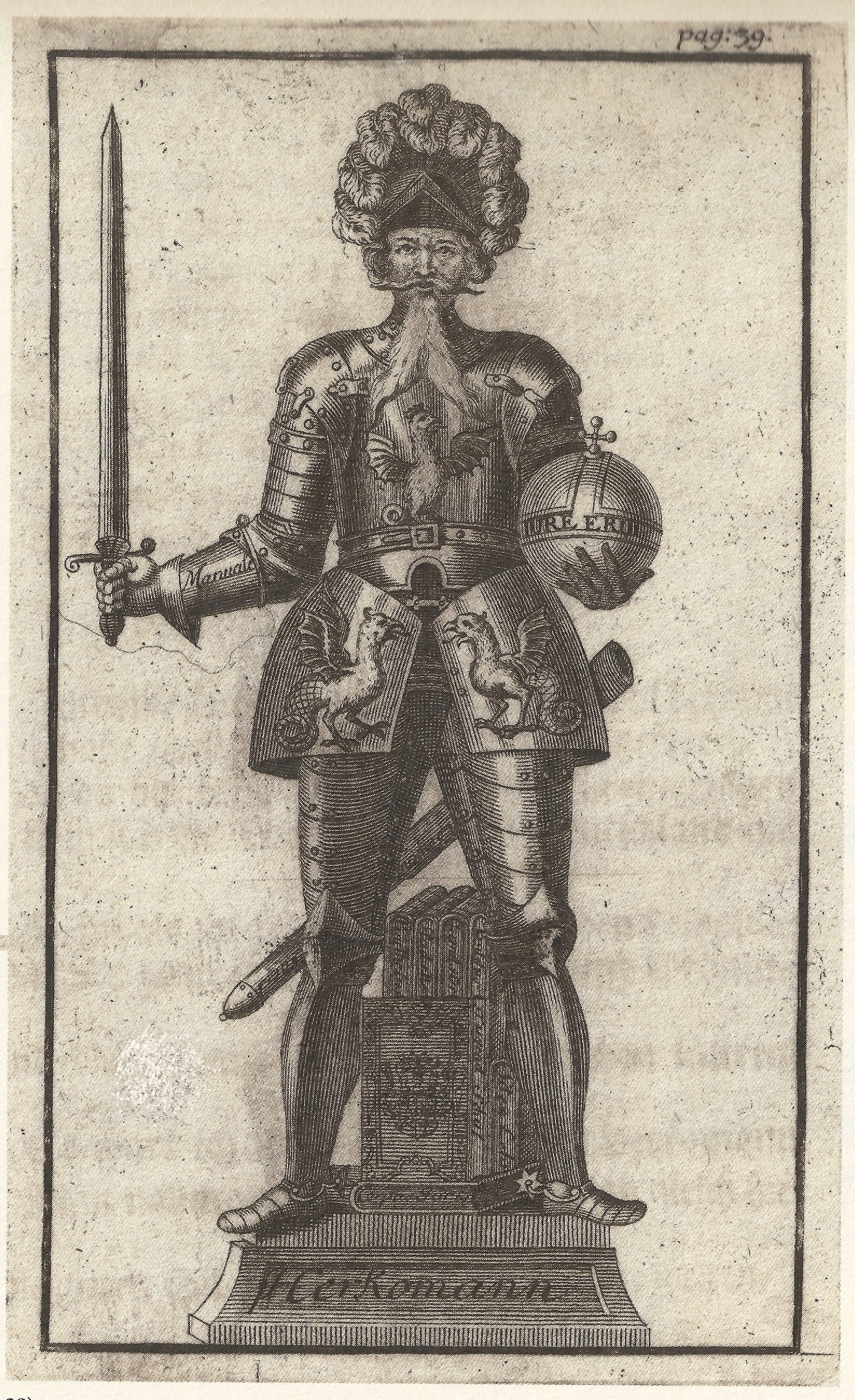 Antonín Birchart rytina Zvykomila hraběte Šporka 1720